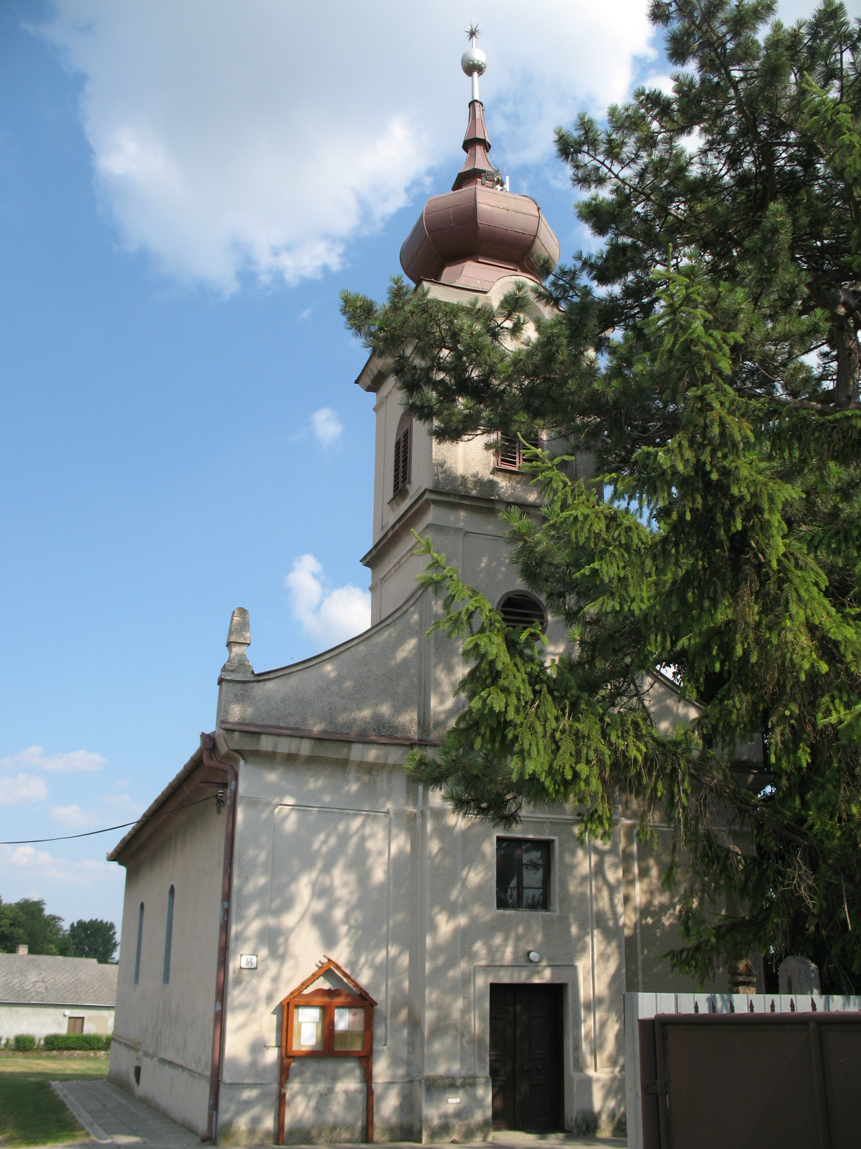 Kulcsod